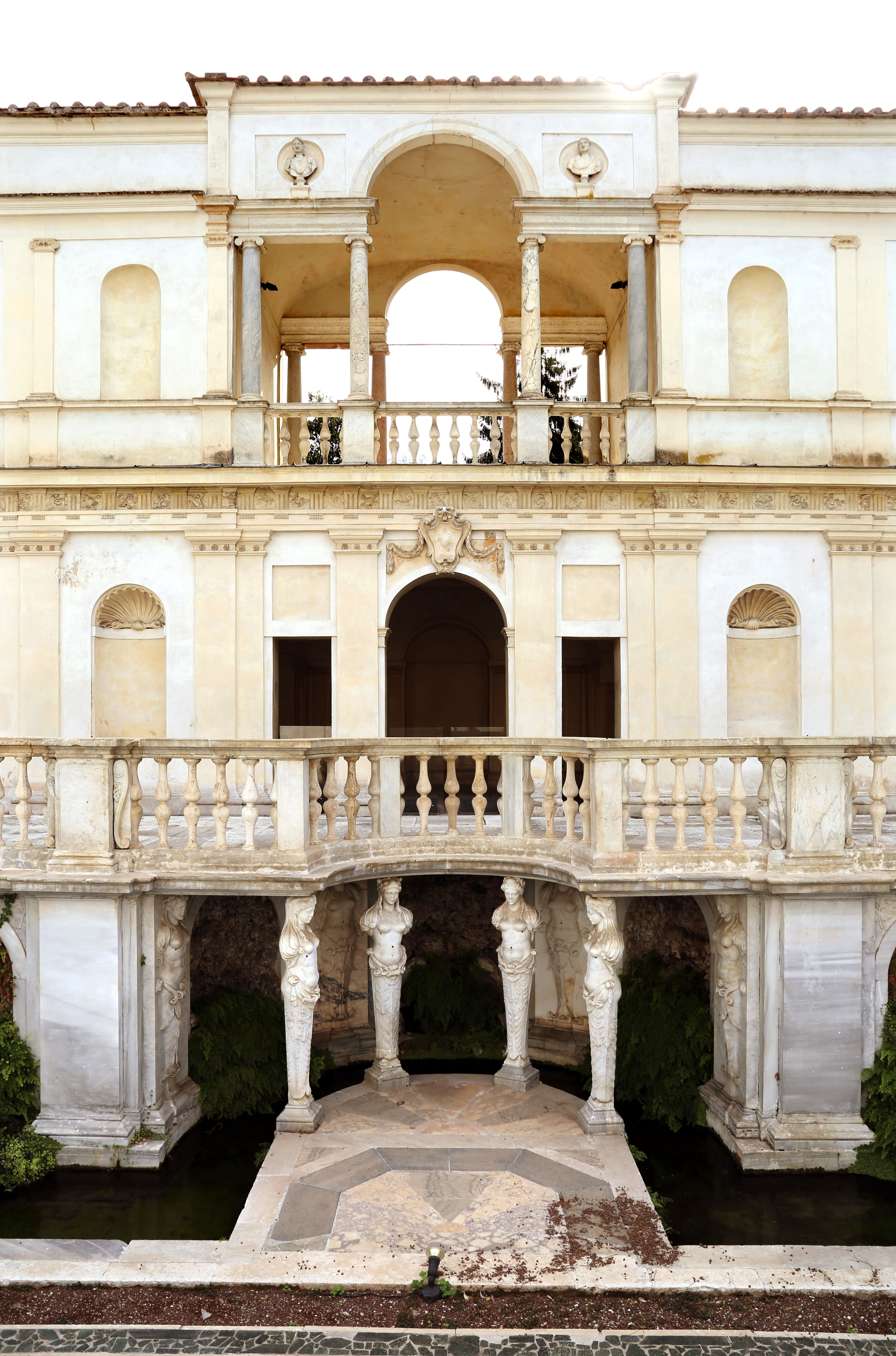 Villa Giulia (Rome) This is a photo of a monument which is part of cultural heritage of Italy.